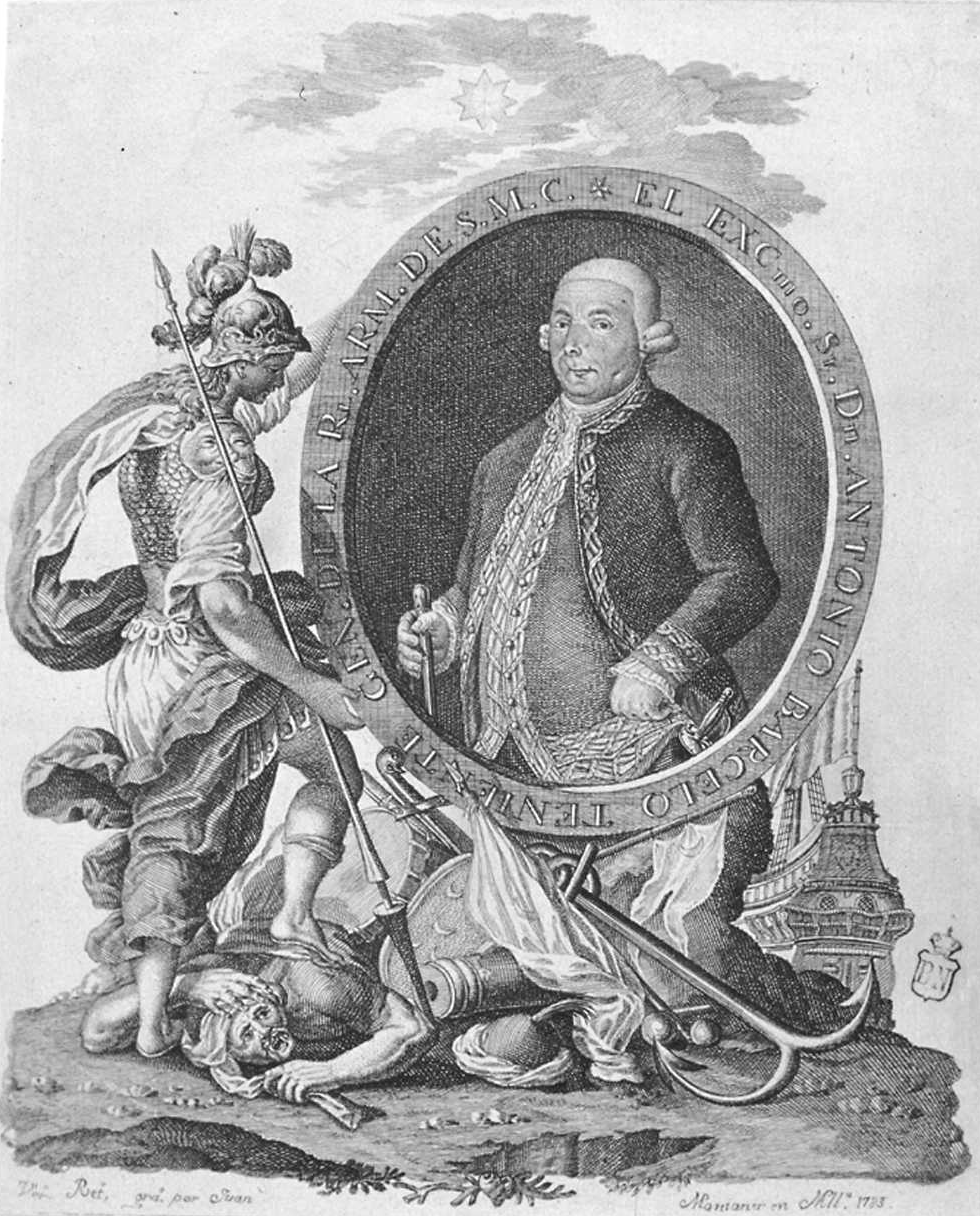 "Retrato de Antonio Barcelo y Pont de la Terra". "El Excellentissimo Señor Don Antonio Barcelo Teniente General de la Real Armada de Su Majestad Catolica."